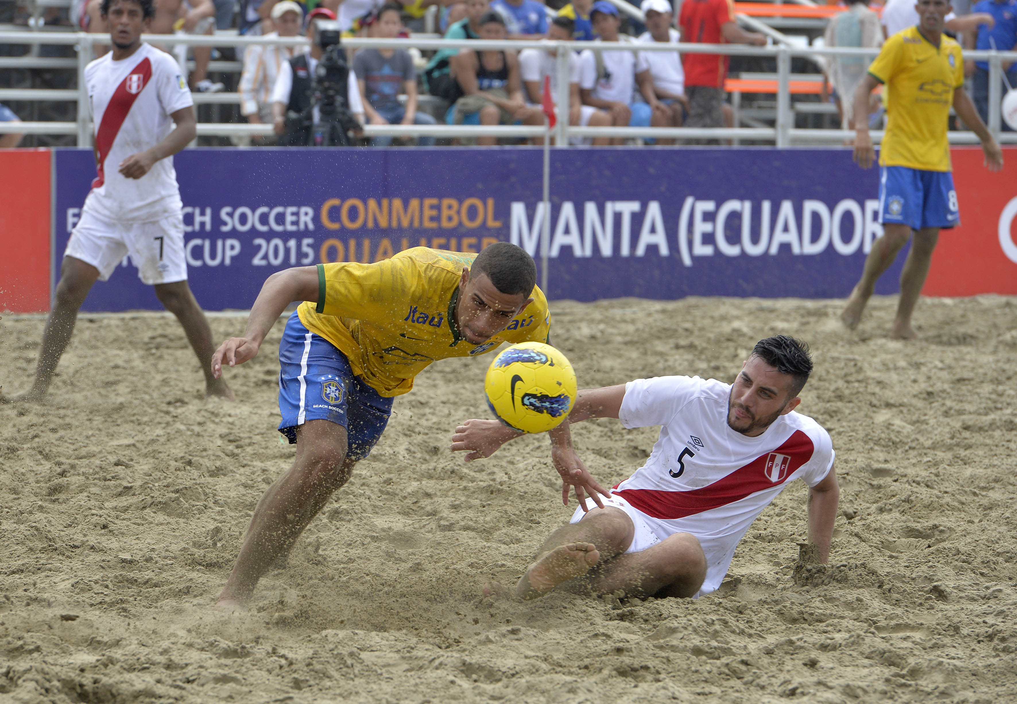 Manta, domingo 19 de abril del 2015 (ANDES).-En Manta se desarrolla el Campeonato Sudamericano de Fútbol de Playa. En la gráfica el partido entre Brasil y Perú Foto:César Muñoz/ANDES